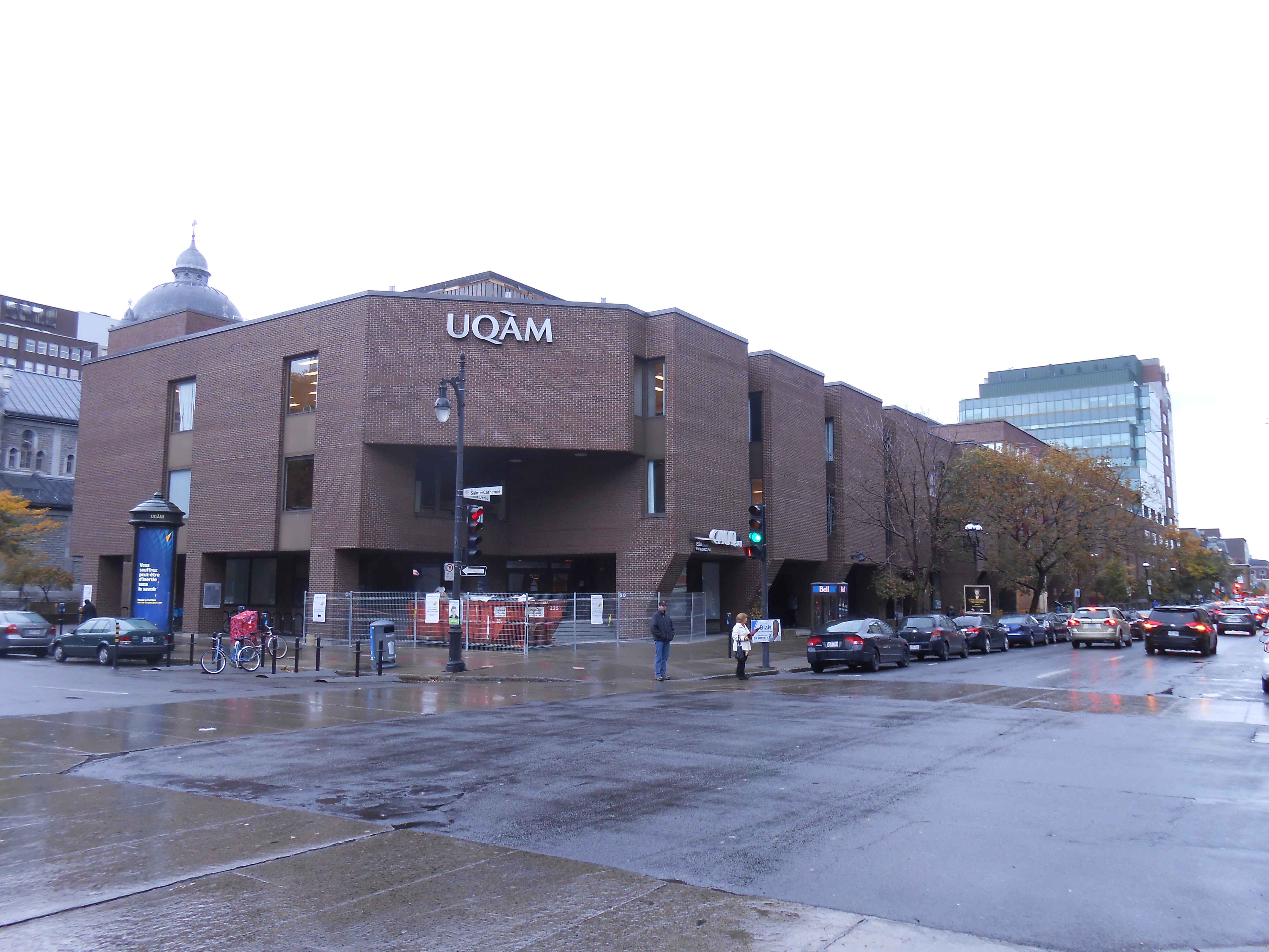 Pavillon Hubert-Aquin, Université du Québec à Montréal (UQAM), 400, rue Sainte-Catherine Est / Saint-Denis / Berri, Montréal uqam.ca